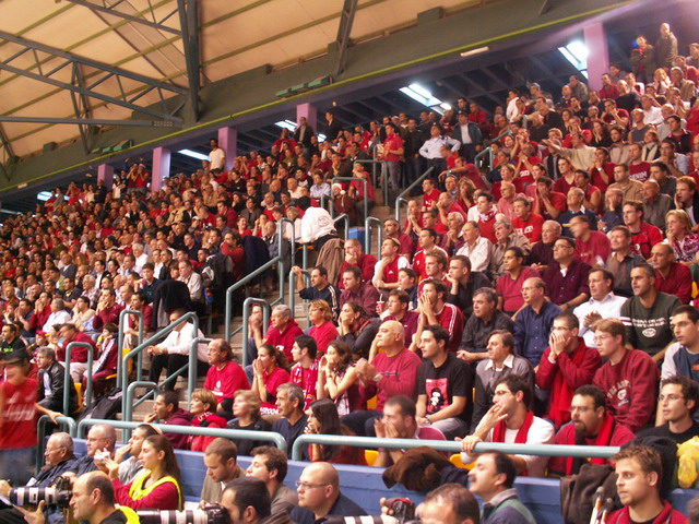 הקהל של הפועל י"ם, מלחה 2005/6, לפני המשחק נגד מכבי ת"א